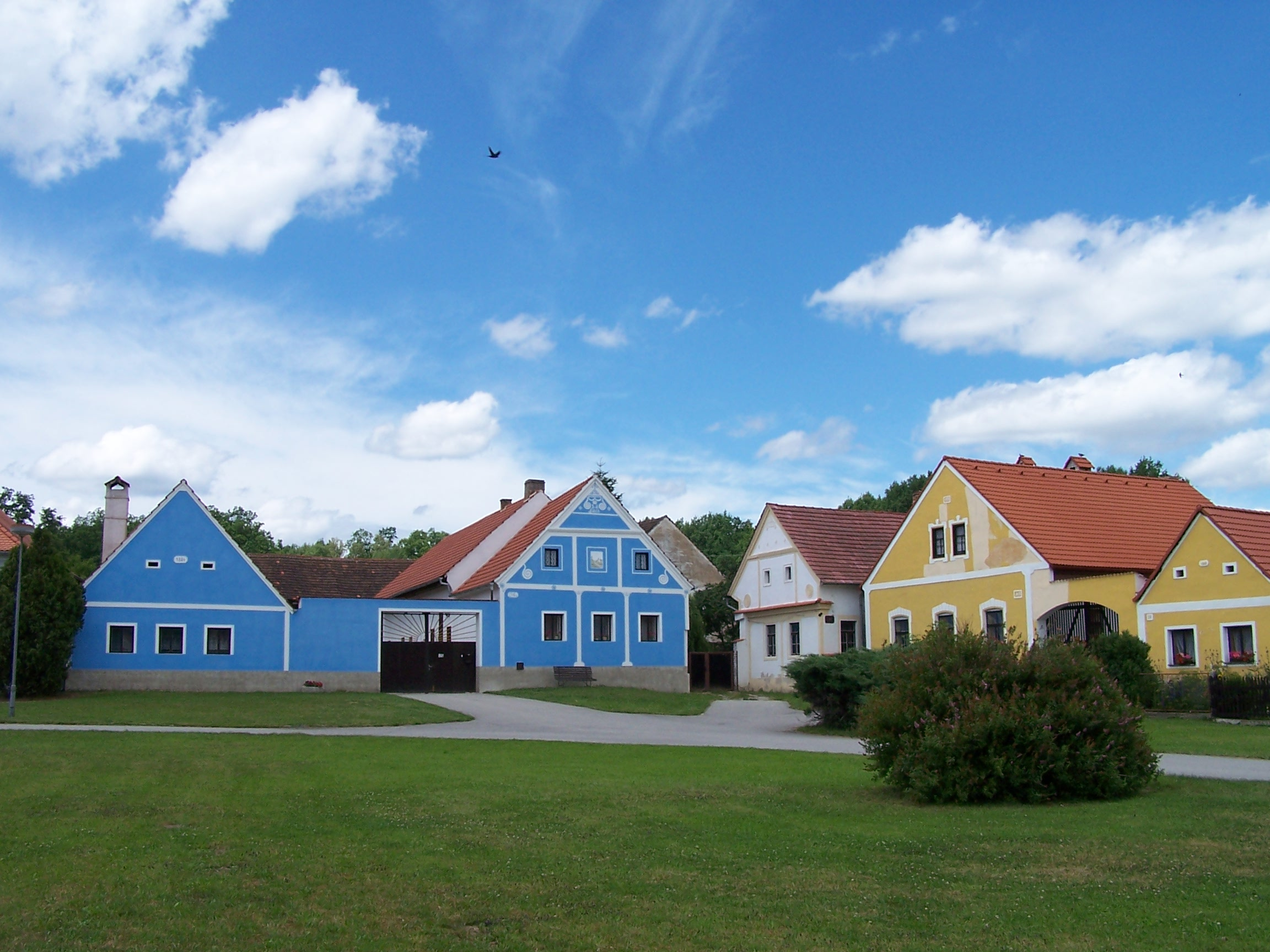 Jihočeská obec Záboří (okres České Budějovice) ve stylu selského baroka